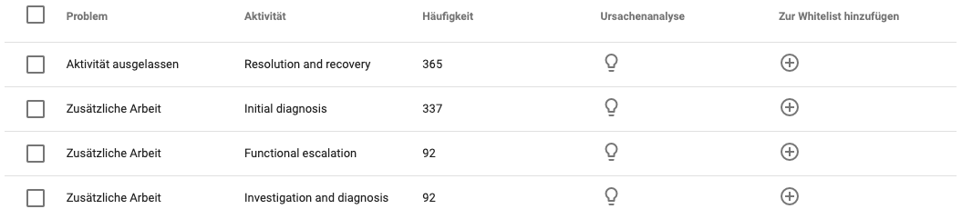 Darstellung von Abweichungen in tabellarischer Form in LANA Process Mining